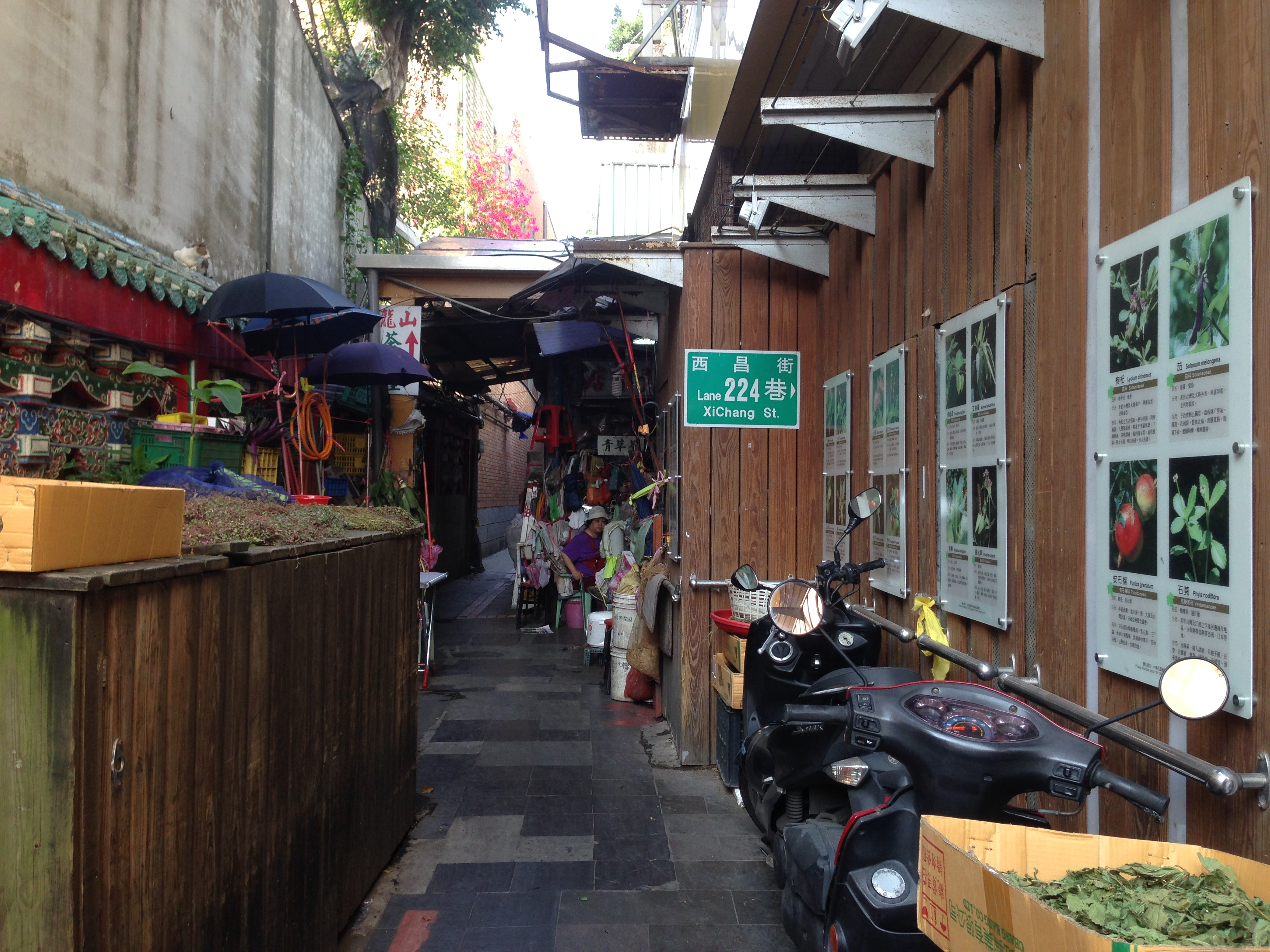 中文（台灣）: 青草巷歷史建築群